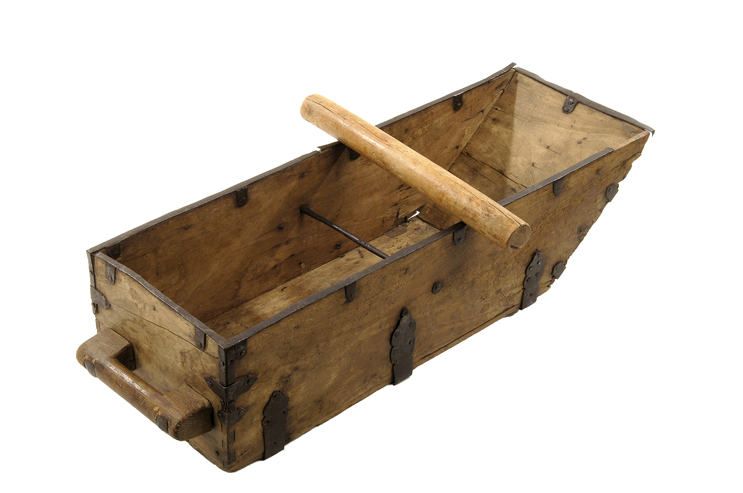 Fotografies dels objectes de l'exposició permanent de la sala "Secà i Muntanya" del Museu Valencià d'Etnologia - Fotografies de Mateo Gamon. Barcella i mitja per a mesurar gra.